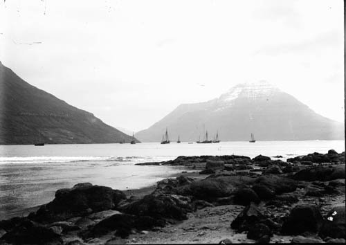 Fuglafjørður, Faroe Islands